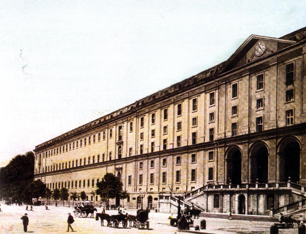 Real Albergo dei Poveri alla fine del XIX secolo. Napoli – Italia.